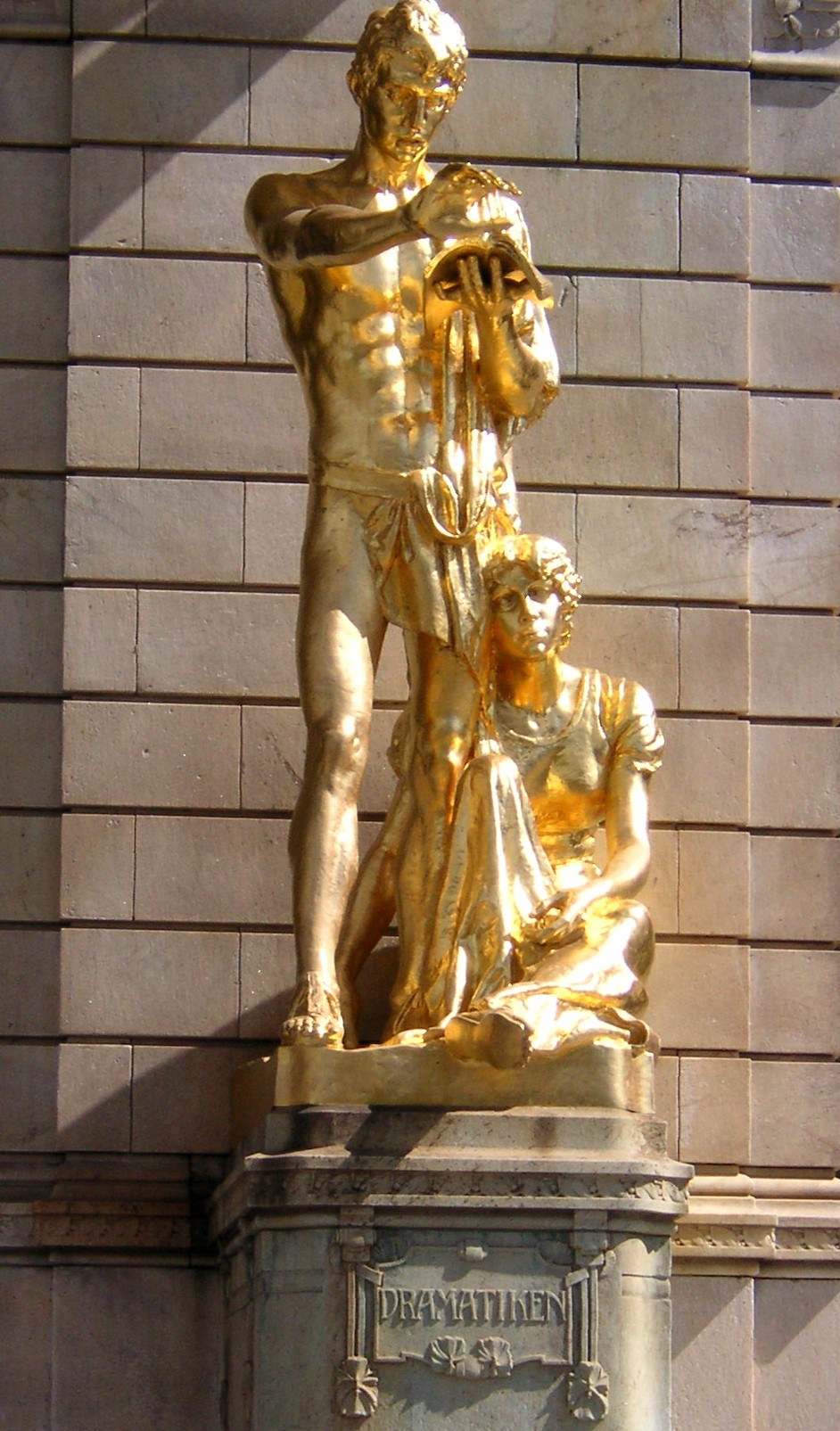 Dramatiska teatern i Stockholm, skulptur vid entrén av skulptören John Börjeson (1835-1910), göts av Otto Meyer